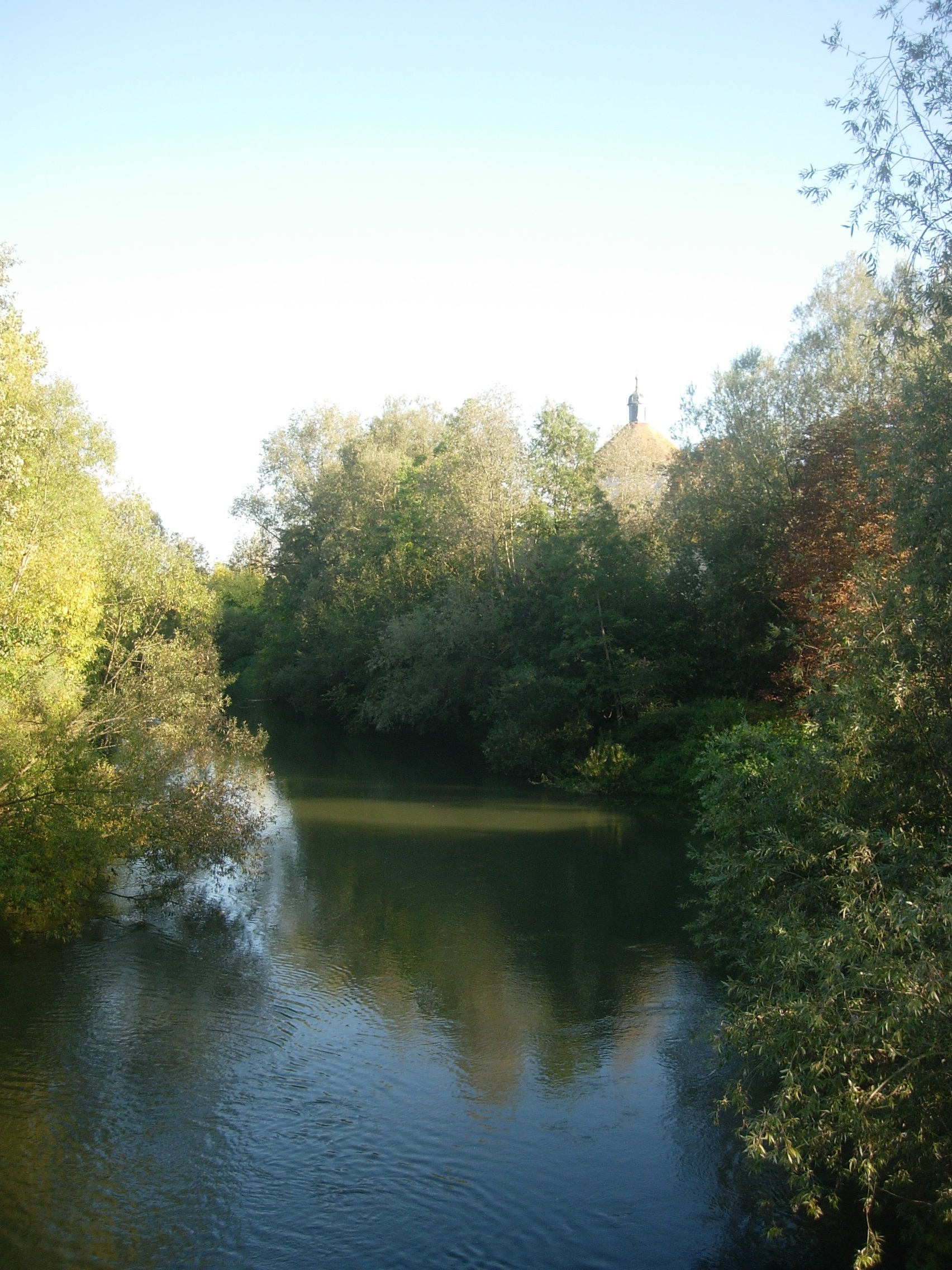 Château de Saint-Lyé vu depuis le pont sur la Seine